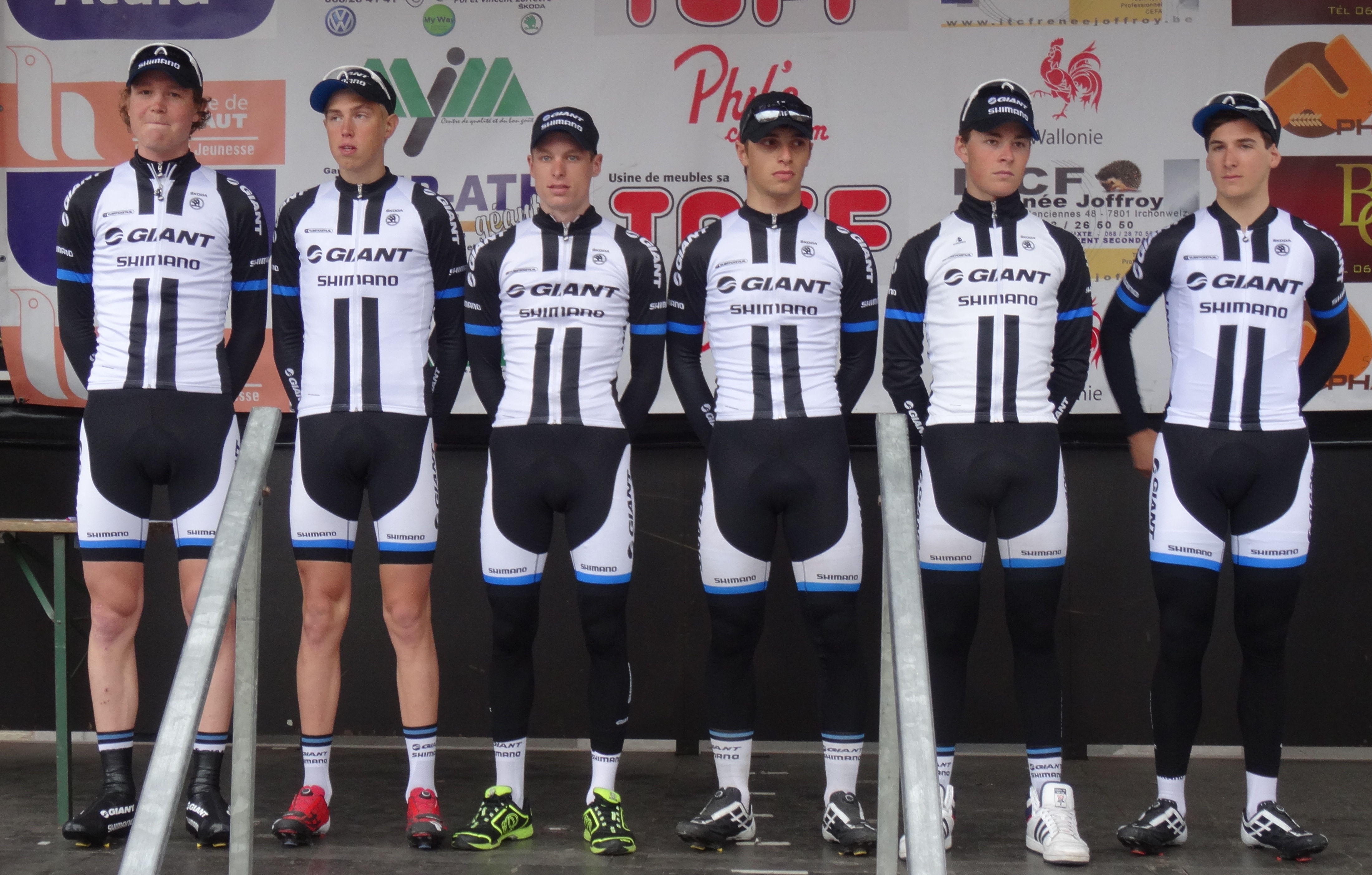 Triptyque des Monts et Châteaux 2014, étape 1, 4 avril 2014, départ d'Antoing. Depicted people: Robert Pölder, Fredrik Ludvigsson, Kristian Haugaard, Jenthe Biermans, Jan Brockhoff and Alex Frame Depicted team: Giant-Shimano Development The creation of these files was made possible thanks to the organizers of the Triptyque des Monts et Châteaux 2014 English | français | +/−